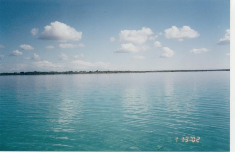 LAguna de Bacalar, Bacalar, Quintana Roo, México